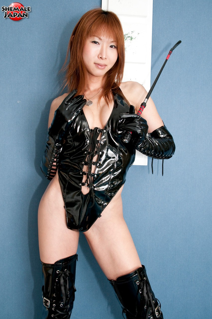 Japanese transsexual porn star Miki Mizuasa